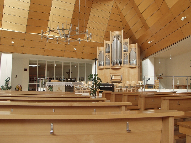 Hauptschiff der Autobahnkirche Haid mit Bankreihen, Altar und Orgel